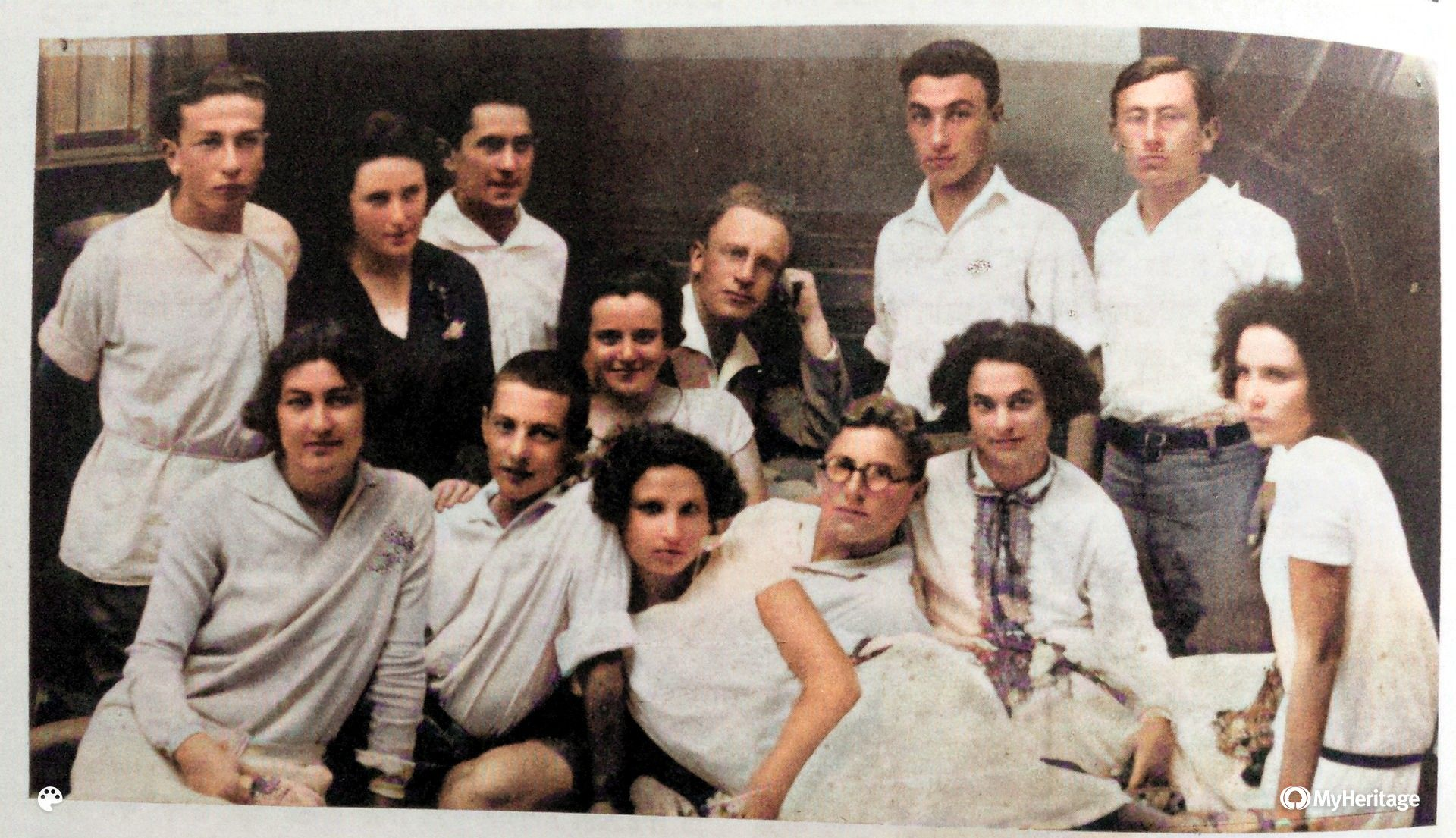 חברי "החוג הזקן" (מימין לשמאל), עומדים: גרשון מרינבך, שבתי פינשריבר, ד"ר ברוך בן יהודה, ימימה אבידר-טשרנוביץ, מאיר מוזס, אפרתיה מרגלית, כתריאל כ"ץ; יושבים: יונה בן-יעקב, יהודית פודולית, שמריה צמרת, ברוריה בן-יעקב, יצחק כפכפי, רבקה יפה, תל אביב המחצית השנייה של שנות ה-20 של המאה ה-20: subst:PAGENAME subst:#if:| {2 }: subst:PAGENAME | subst:#if:| {3 }: subst:PAGENAME | subst:#if:| {4 }: subst:PAGENAME | subst:#if:| {5 }: subst:PAGENAME | subst:#if:| {6 }: subst:PAGENAME | subst:#if:| {7 }: subst:PAGENAME | subst:#if:| {8 }: subst:PAGENAME | subst:#if:| {9 }: subst:PAGENAME | subst:#if:| {10 }: subst:PAGENAME